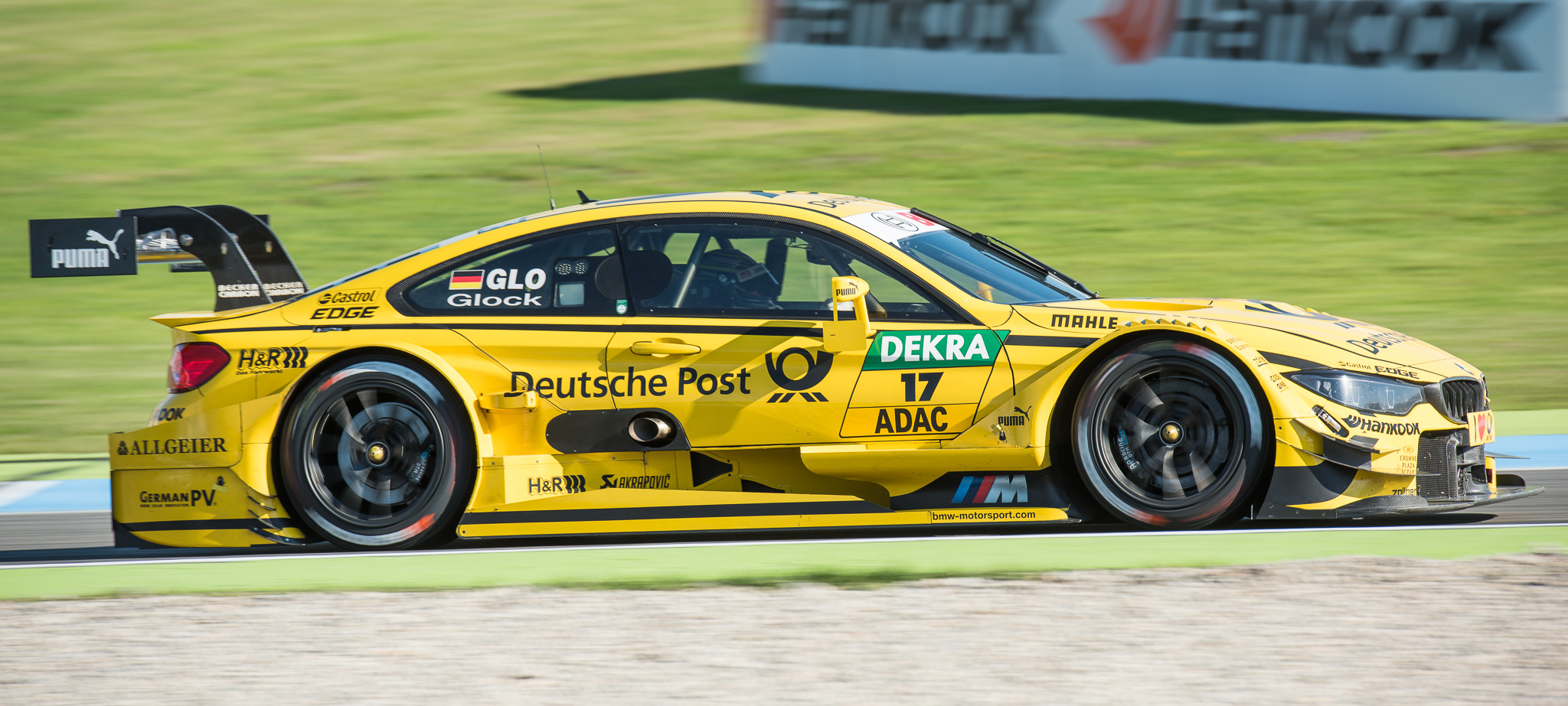 DTM,Deutsche Post BMW M4 DTM,Deutsche Tourenwagen Masters,Hockenheimring,MTEK GmbH,Motorsport,Timo Glock